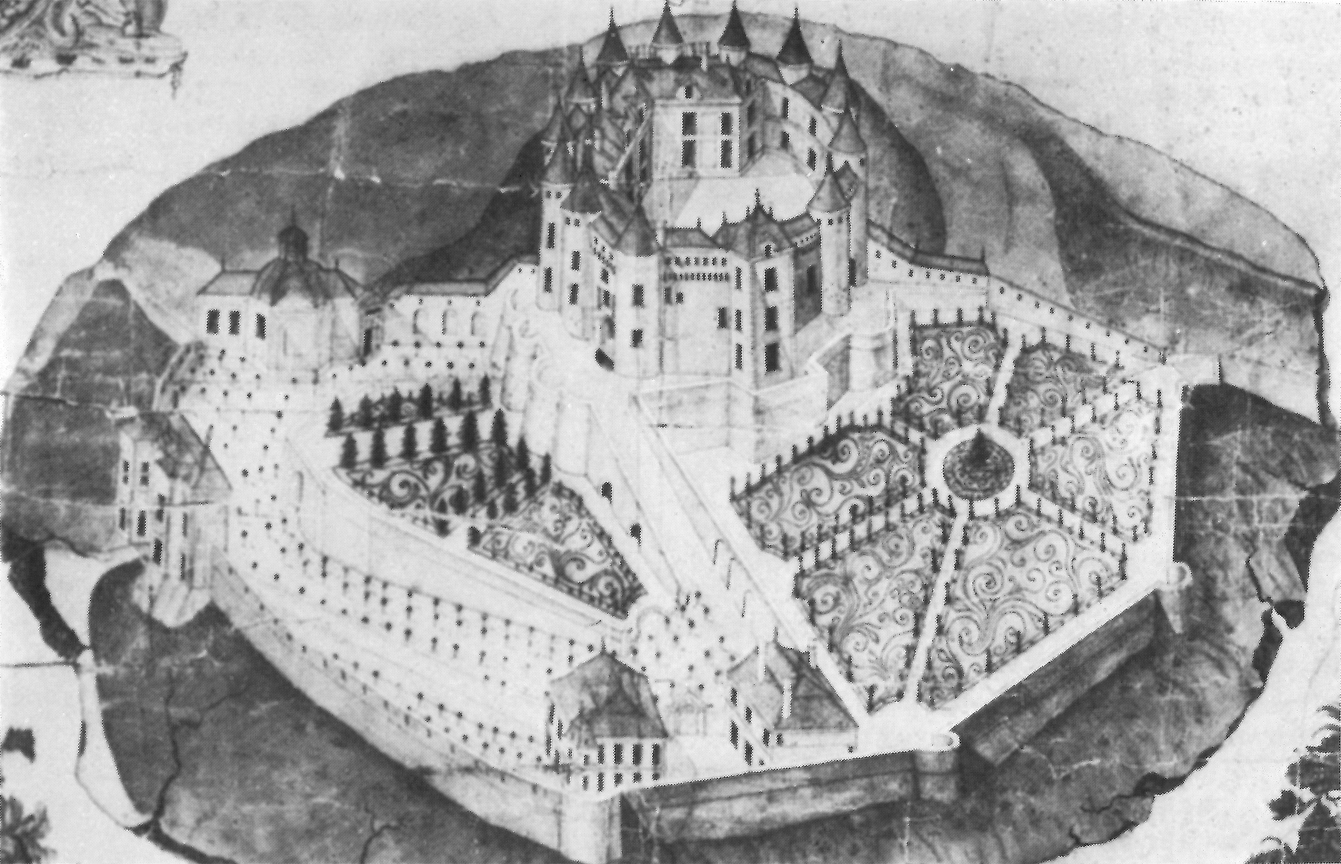 Château de Seigneley, vue cavalière